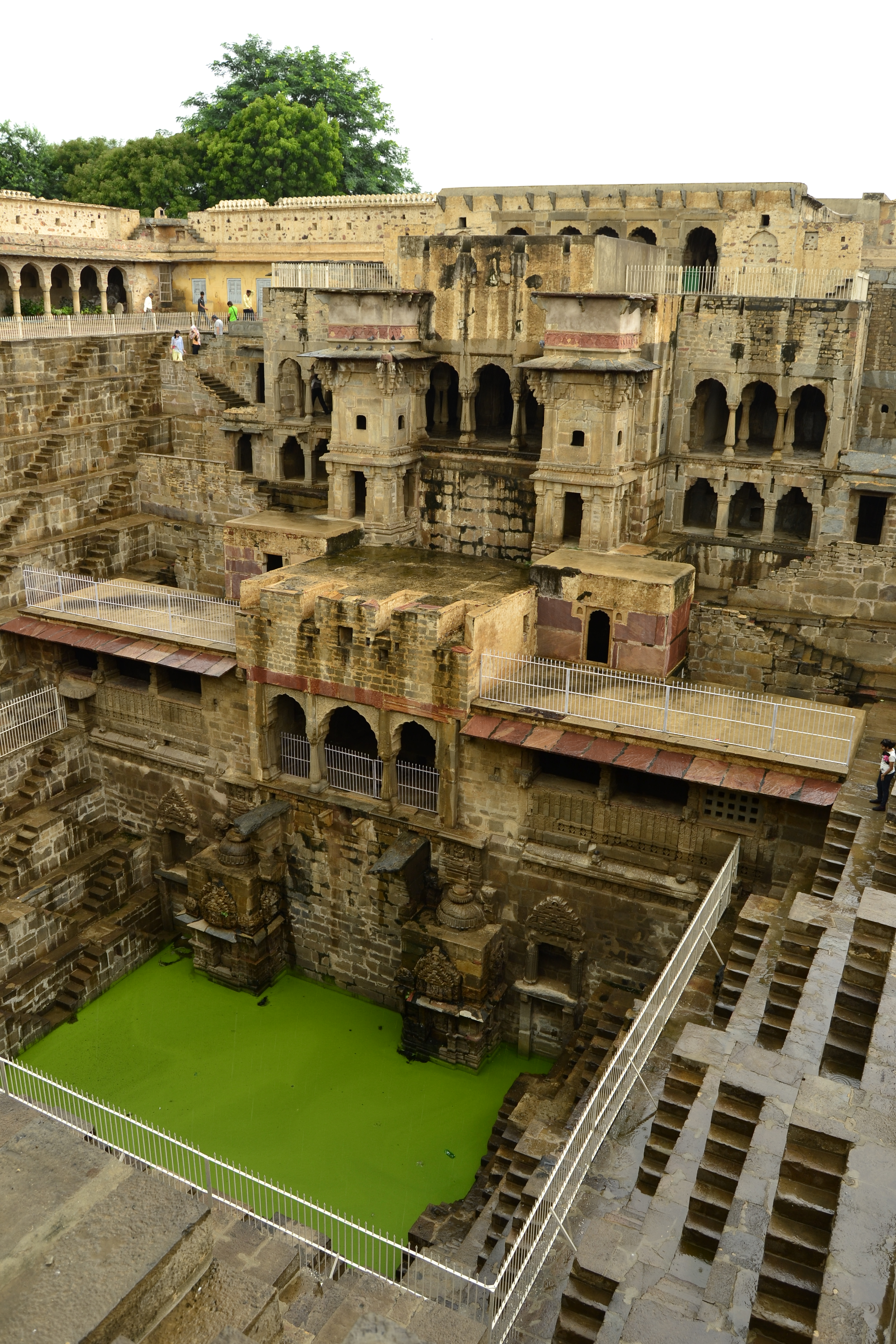 колодец Чанд Баори